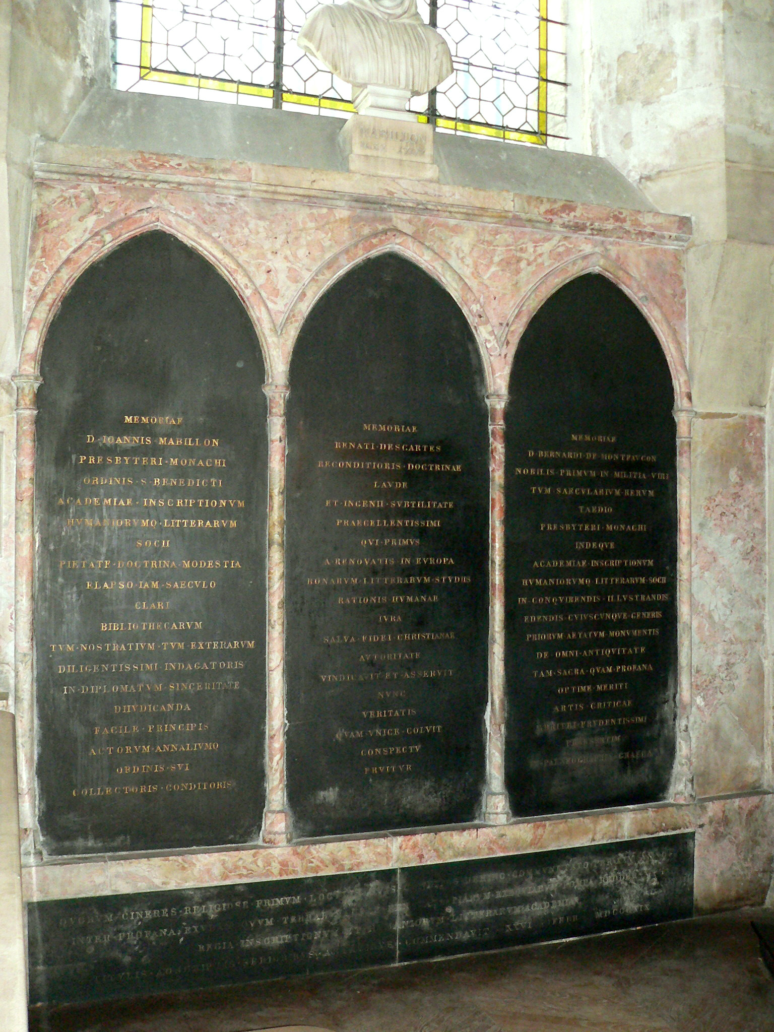 Triple plaque funéraire: Mabillon, Descartes, Montfaucon